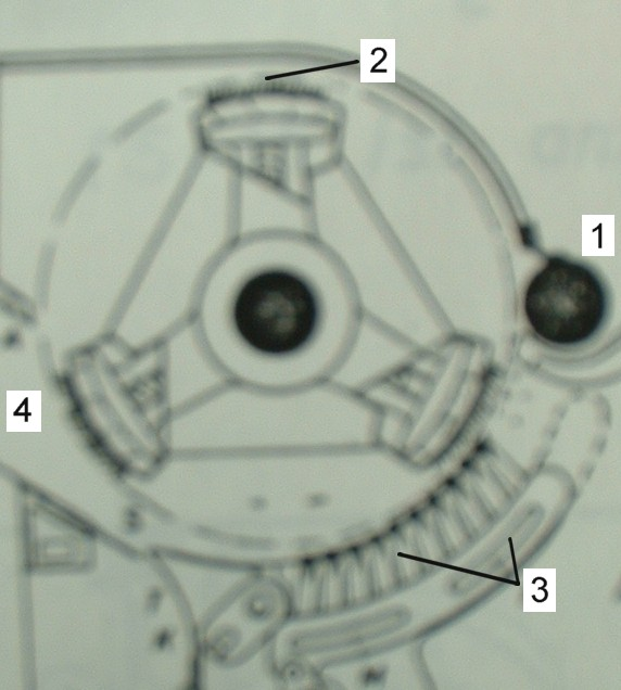 Schlagmaschine für Baumwolle: Kirschnerflügel